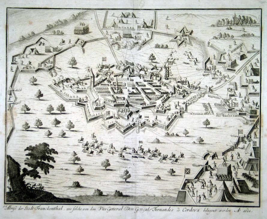 Abriss der Stadt Franckenthal, wie solche von dem Vice General Don Goncalo Fernandes de Cordova belagert worden A. 1621